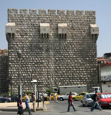 Zitadelle von Damaskus, eigenes Foto von 09/2006, public domain